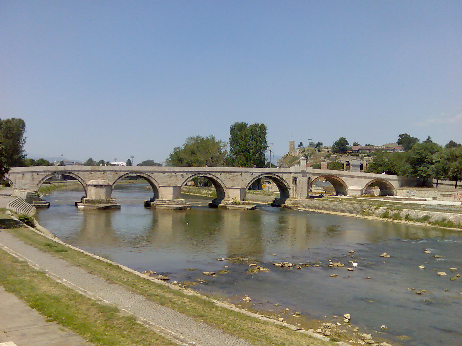 Поглед кон исушениот Вардар и Камениот мост со новата стражарница.